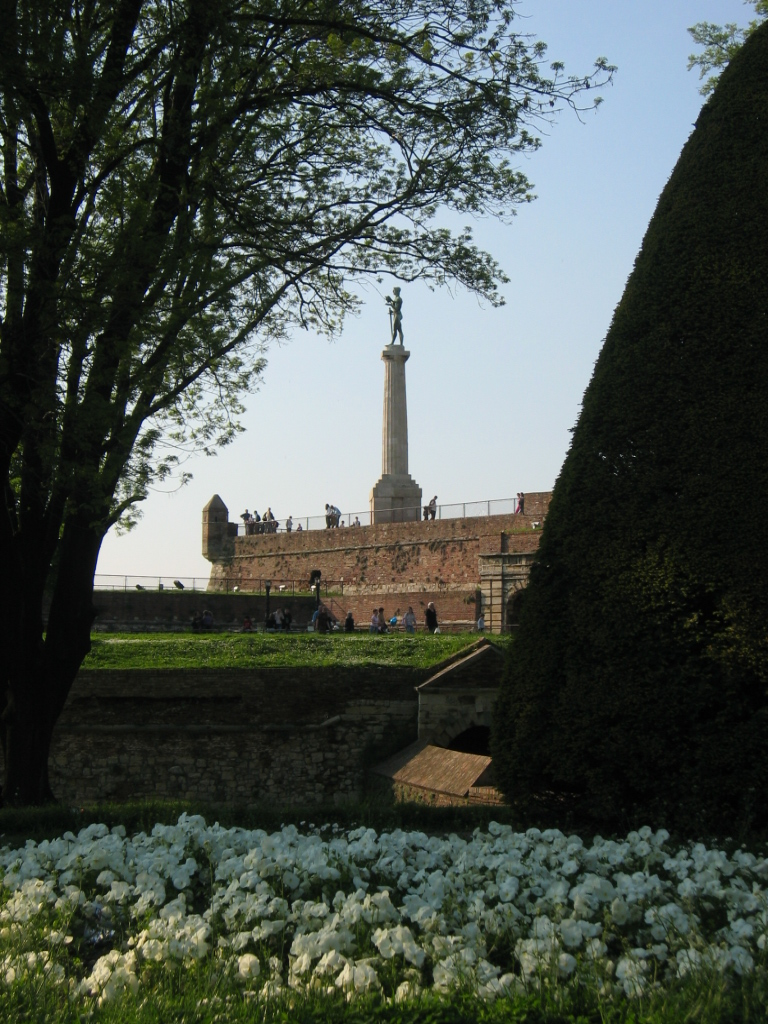 Description= "Pobednik", die Statue des "Siegers" auf der Festung Kalemegdan in Belgrad, Serbien. Date= april 2006 Author= Sanja B.